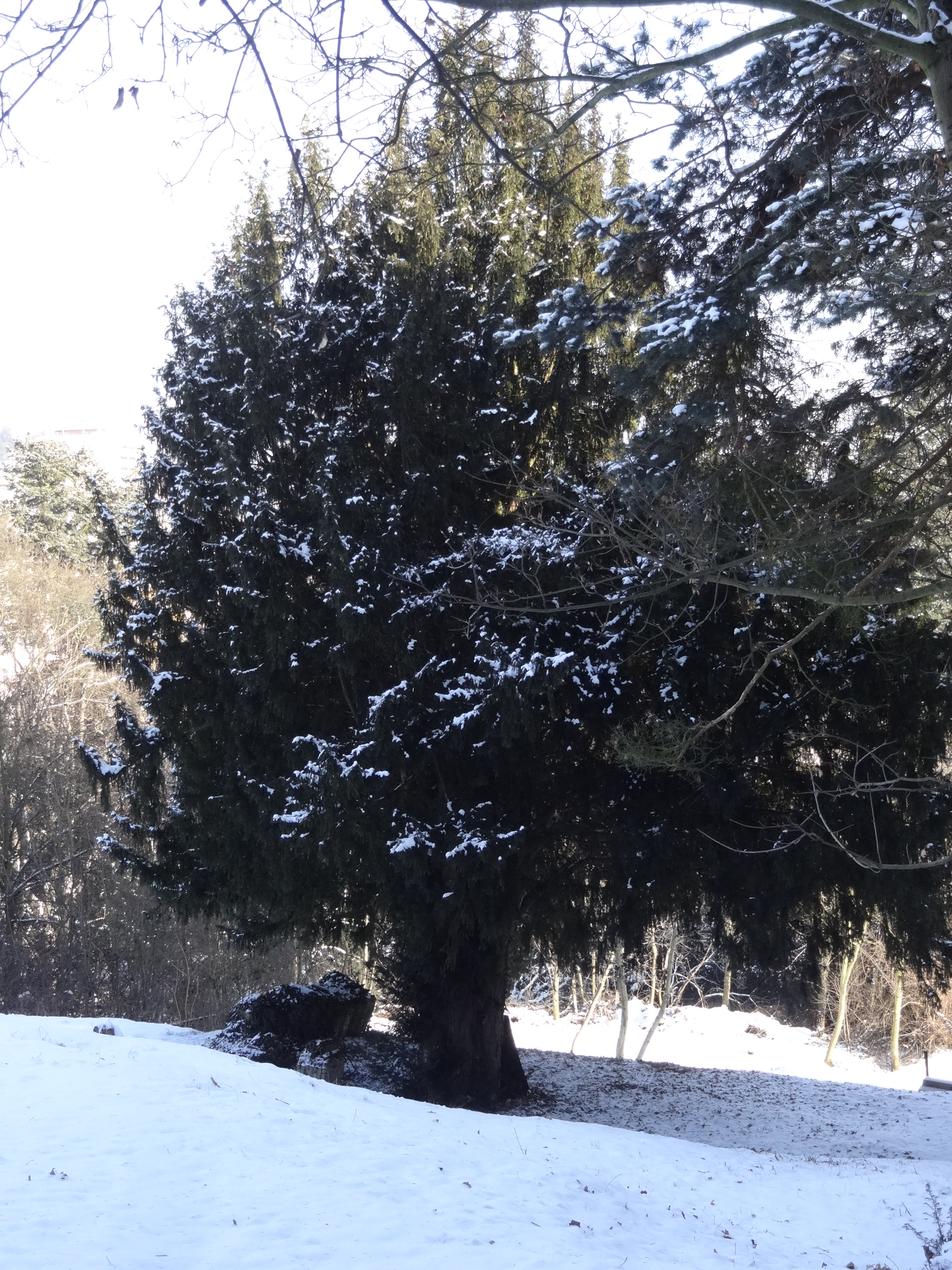 Košíře - památné tisy červené v zahradě usedlosti Turbová